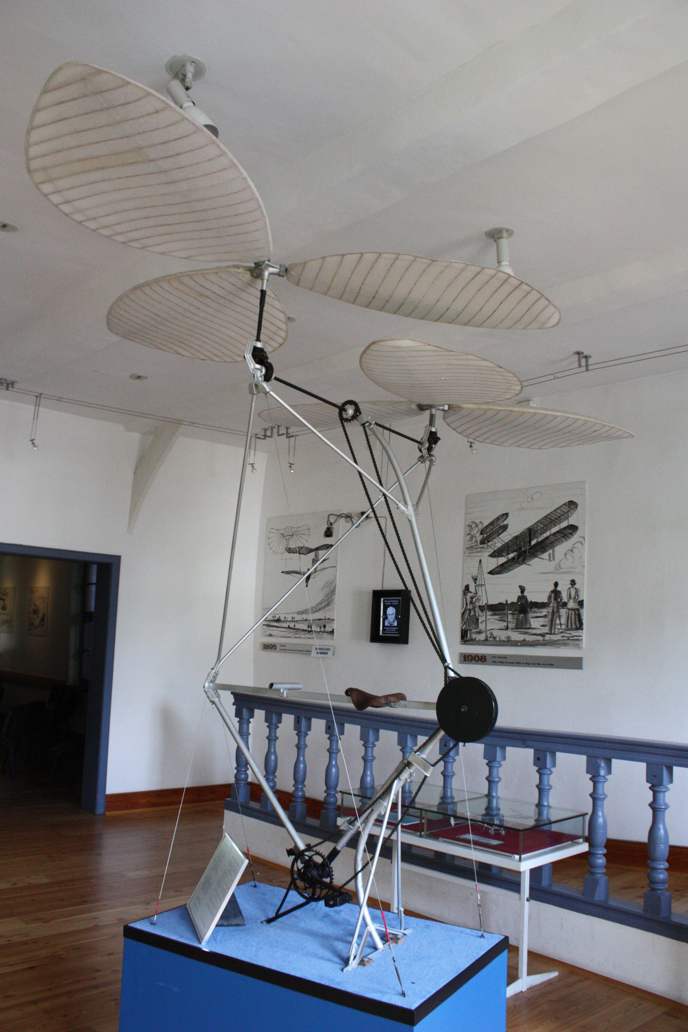 Hubschraubermuseum Bückeburg; Experimenta; Pedalcopter (mit Planetengetriebe); nicht abgehoben; Hersteller: Schlosserlehrling Hand D. Gosslich (damals noch keine aerodynamischen Kenntnisse; später Ing.); Deutschland 1949; Leergewicht: 23 kg; Abfluggewicht: 100 kg; Rotordurchmesser: ca. 2 m; Länge: 1,20 m; Triebwerk: Muskelkraft; Leistung: ca. 0,22 kW (ca. 0,3 PS; für einen Flug wären mindestens 1 kW oder 1,33 PS erforderlich gewesen); Plätze: 1